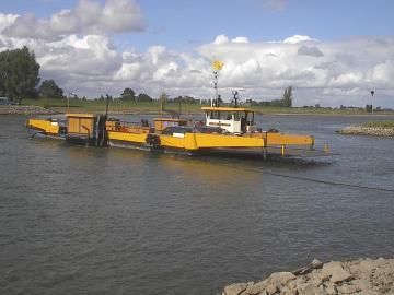 Veerpont Wijhe-Vorchten (Heerde)